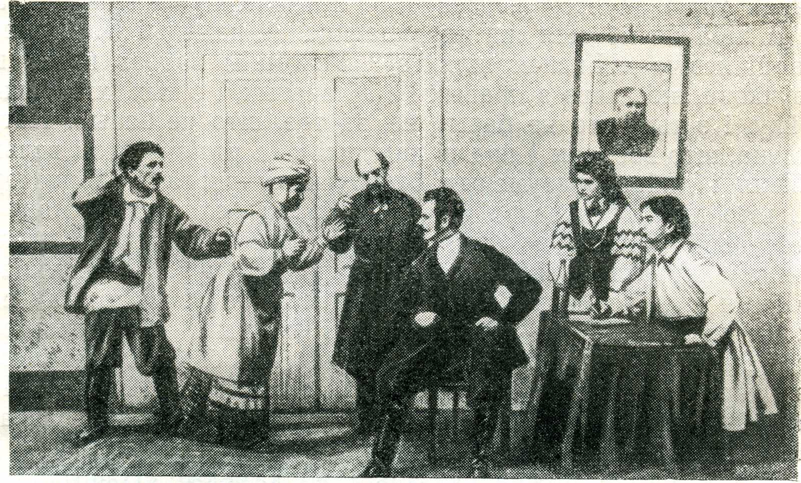 Беларуская (тарашкевіца): Сцэна з спэктаклю «Па рэвізіі» М. Крапіўніцкага (Тэатар Ігната Буйніцкага)